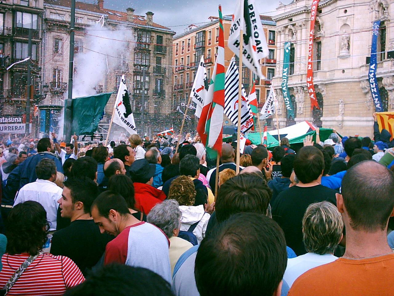 Lanzamiento del Txupin (que no txupinazo) de la Semana Grande de Bilbao de 2005.